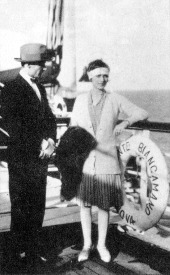 Giuseppe Pistone e Maria Fea, protagonistas do crime da mala, ocorrido em São Paulo em outubro de 1928.